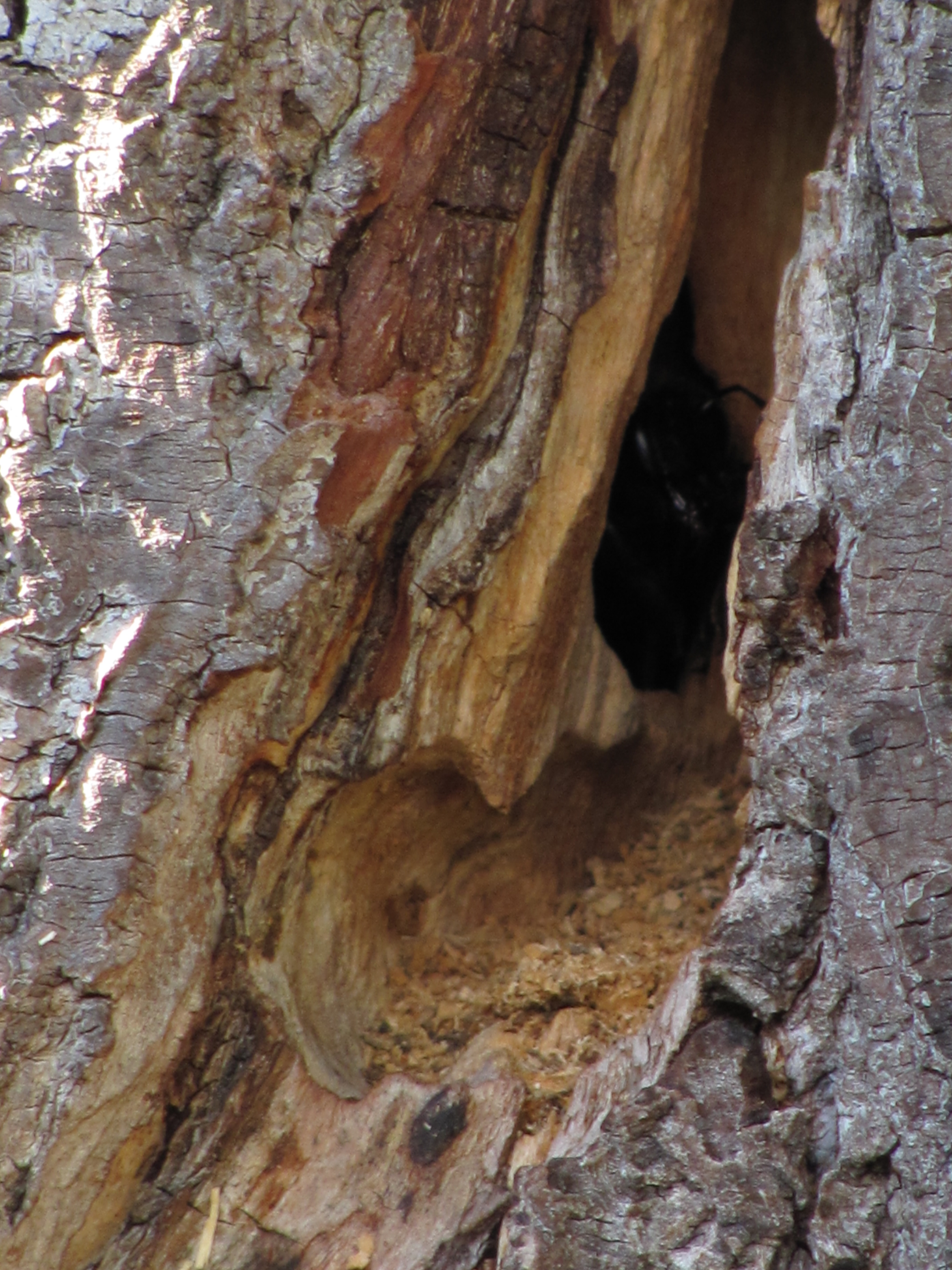 Radebeul, Holzbienen-Nestgänge in Totholzstamm einer Trauerweide